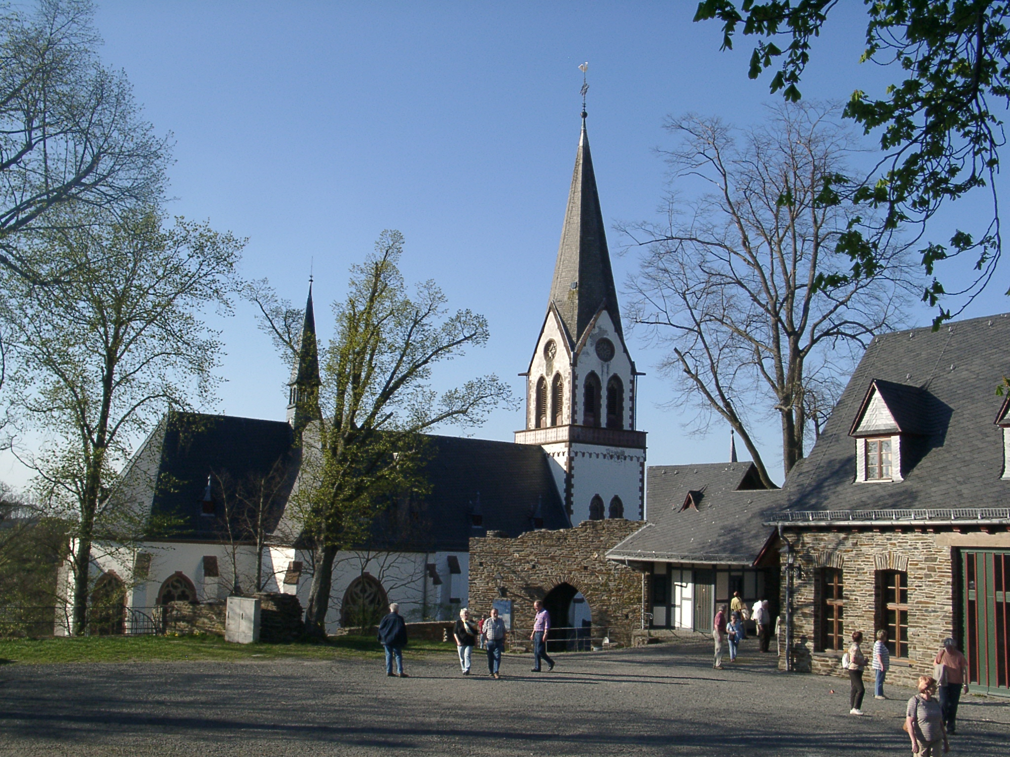 Burg Kastellaun